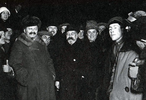 Лидеры левой оппозиции Л. Д. Троцкий, Л. Б. Каменев и Г. Е. Зиновьев. Середина 1920-х годов